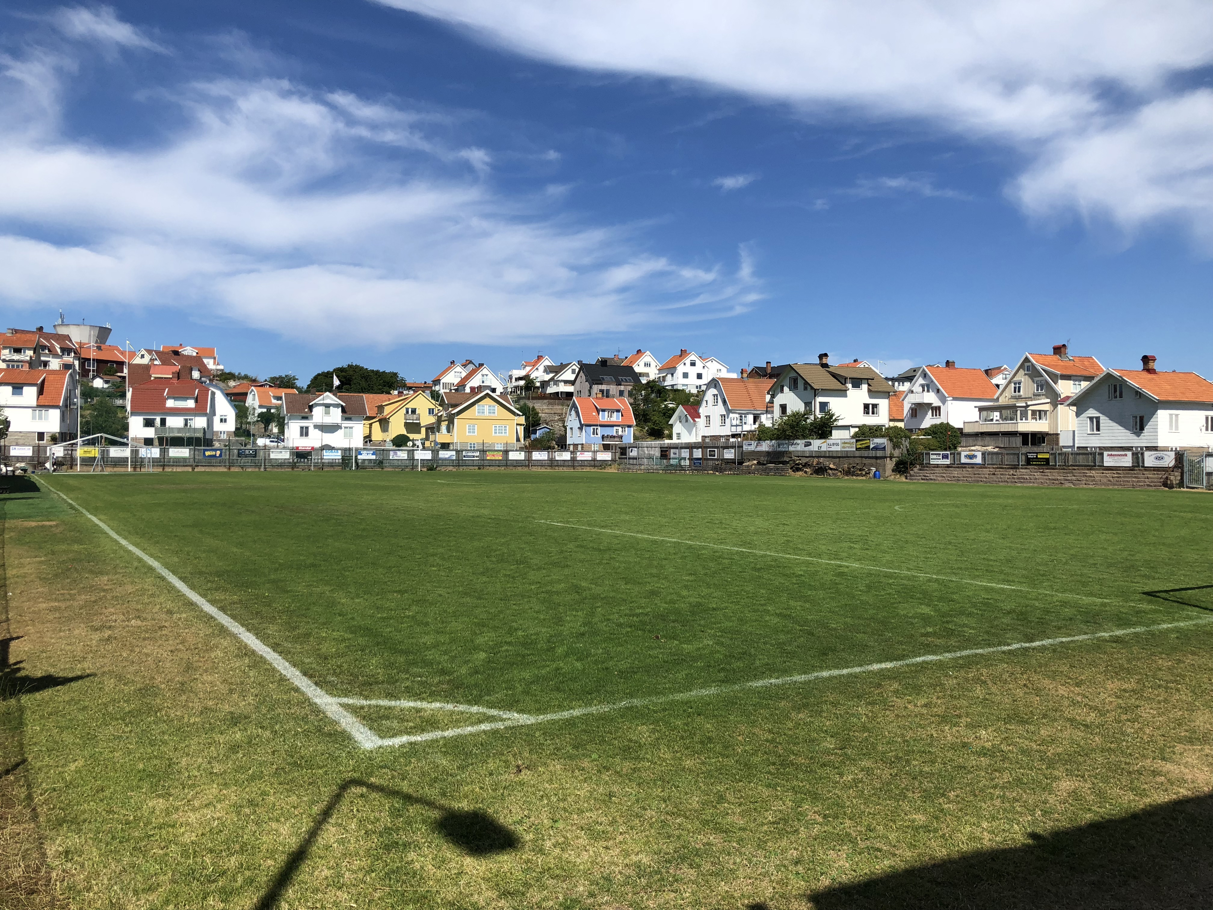 Havsvallen på Smögen, Juli 2018